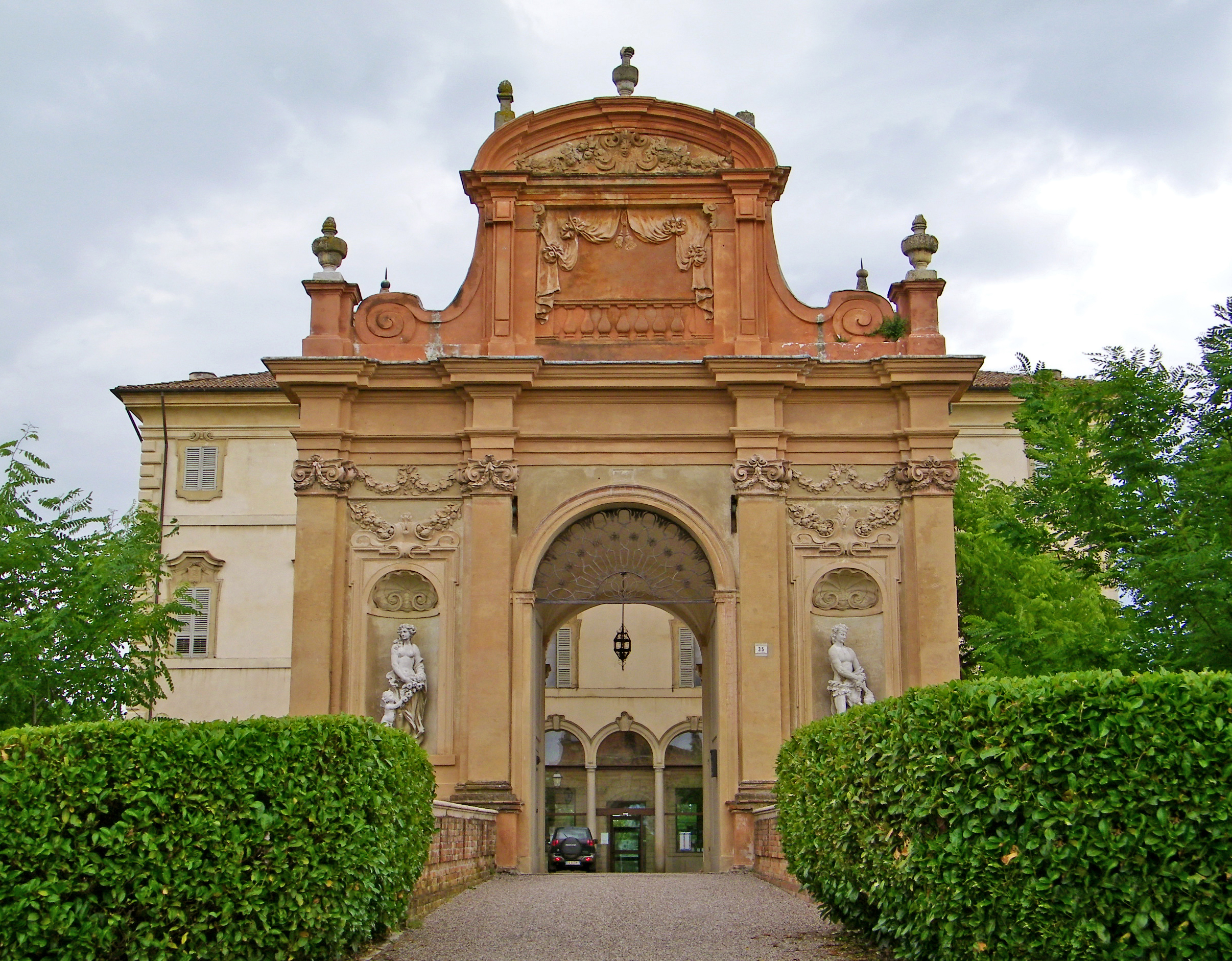 Villa Pallavicino (Arco del Corpo di guardia - lato esterno)